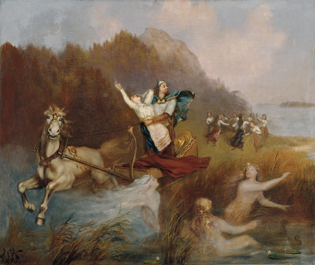 Lemminkäinen abducts Kyllikki, 11th song from Kalevala.